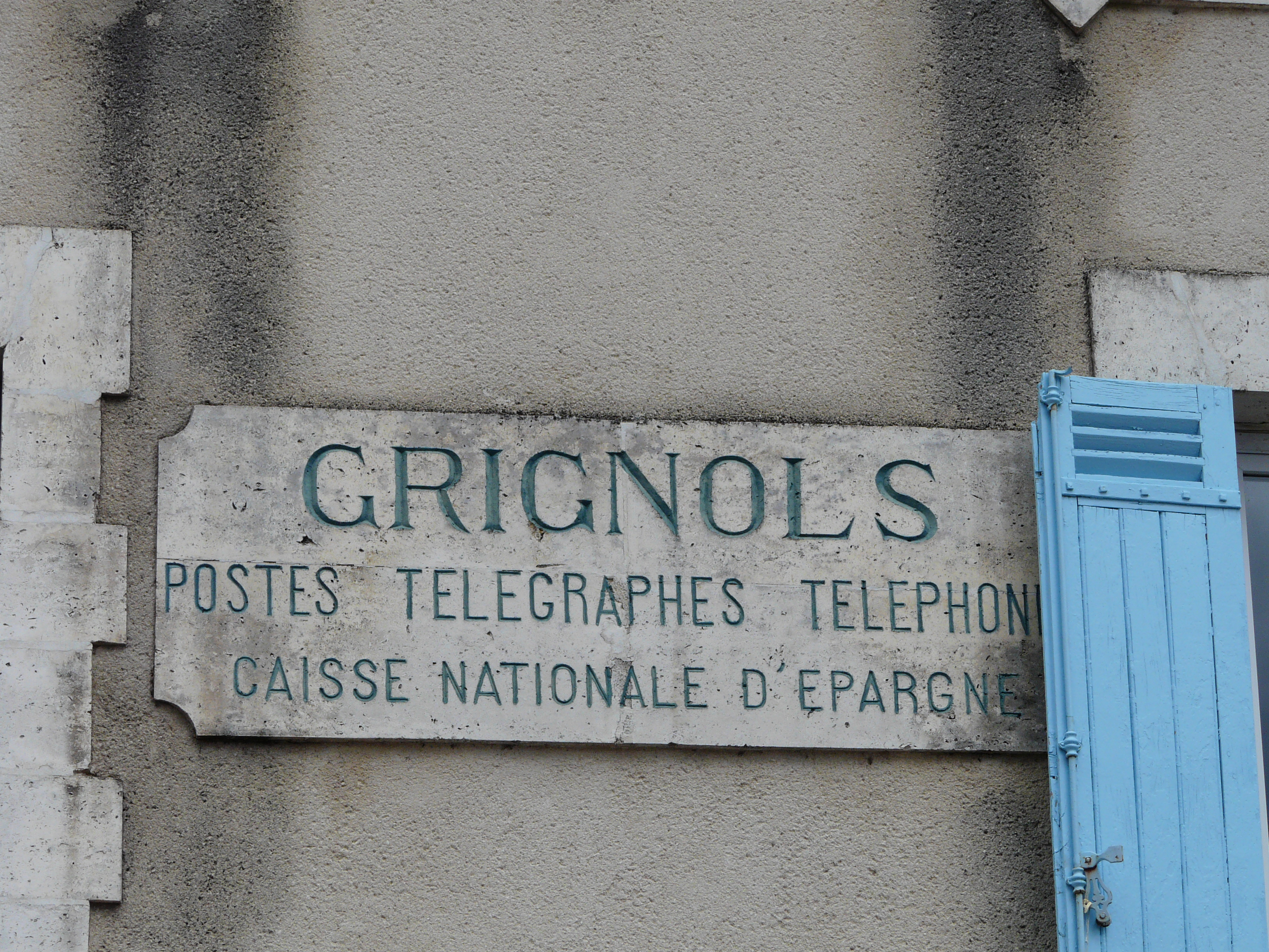 Ancienne agence des Postes, télégraphes et téléphones, Grignols, Dordogne, France.